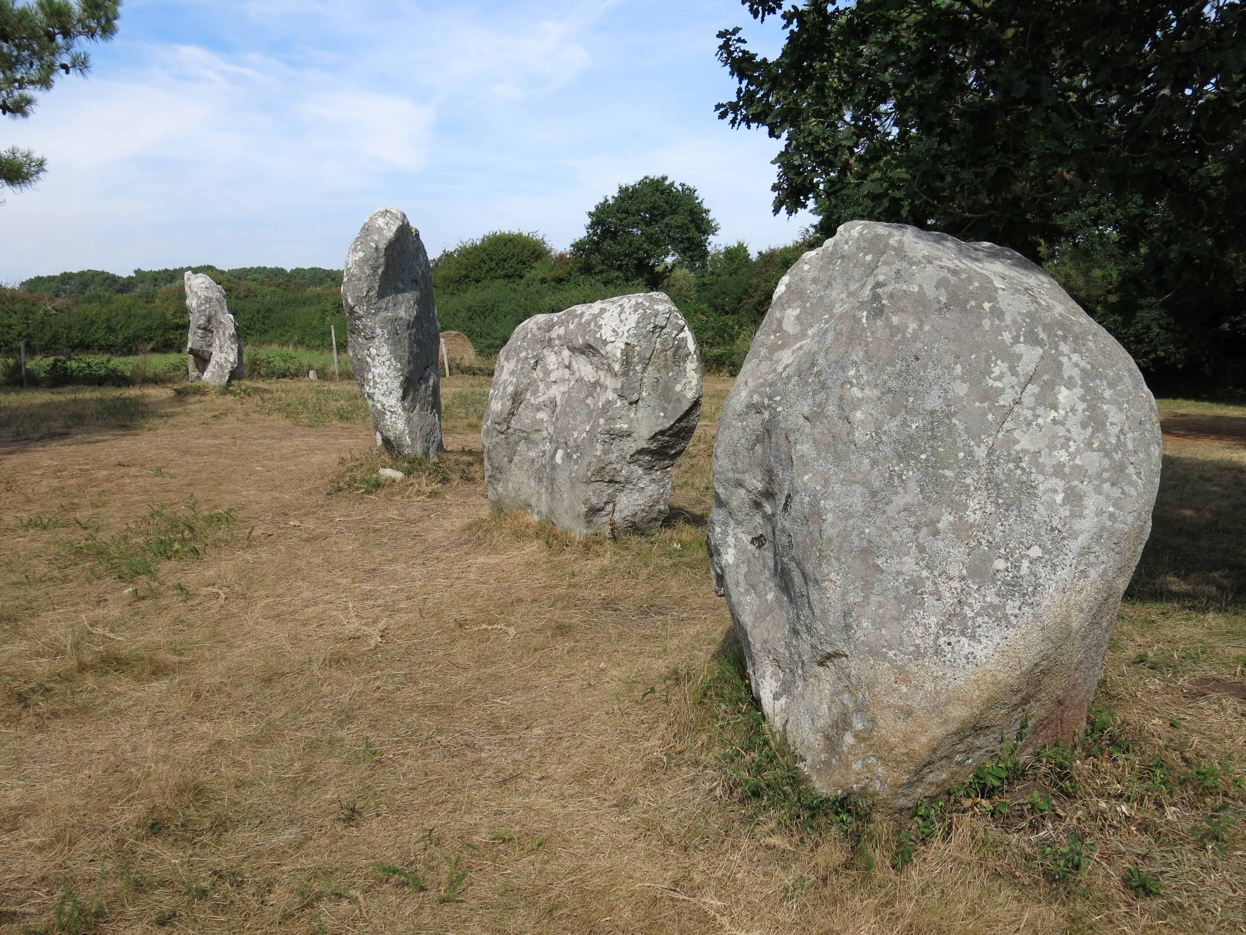 Cromlech de Crucuno situé sur la commune d'Erdeven .